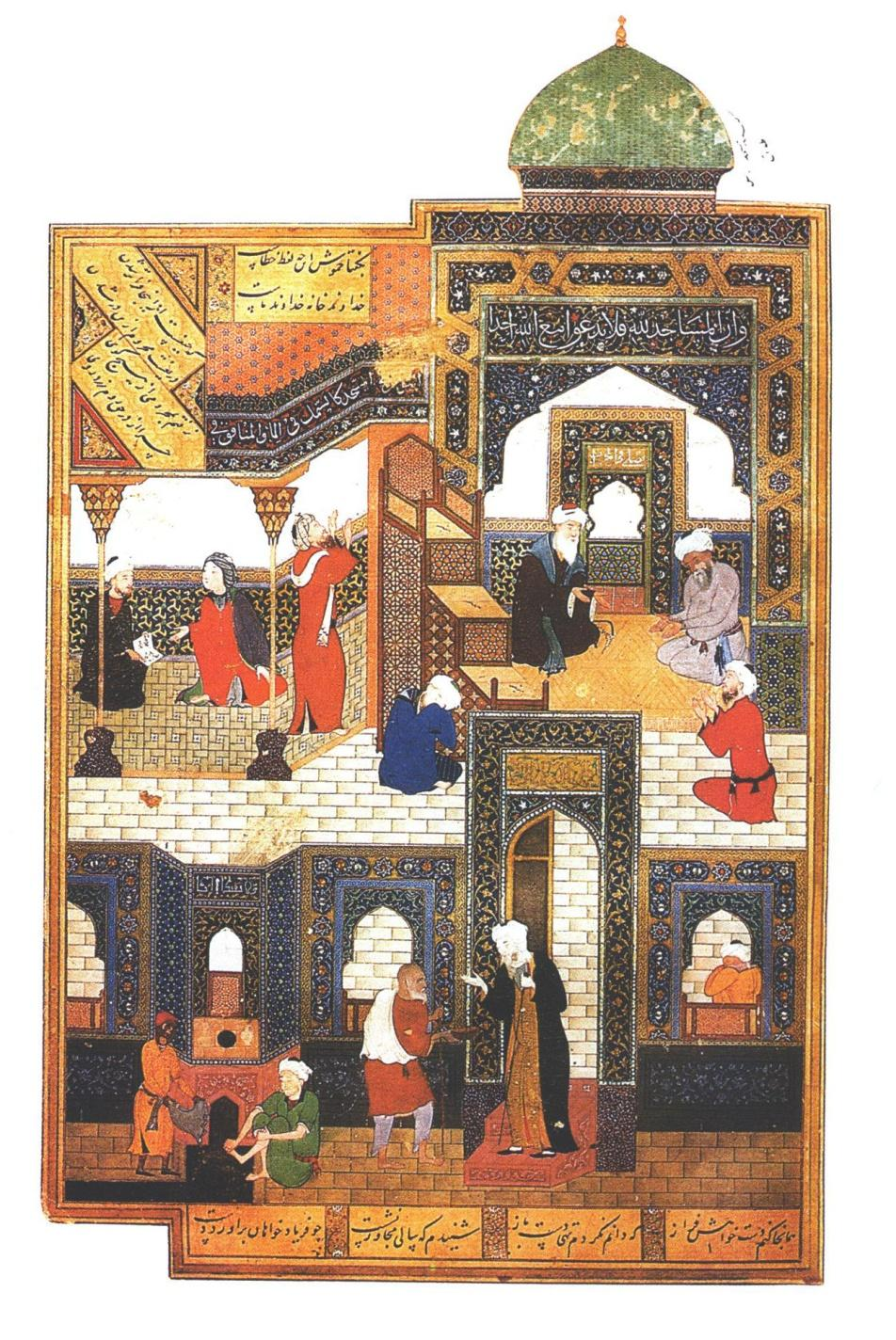 Typisch für Behzāds ausgereiften Stil: ein Bettler vor der Moschee, Illustration zu Saadis Bustān. Behzāds Signatur steht auf dem Blatt, das die linke Person im Raum oben links in den Händen hält.